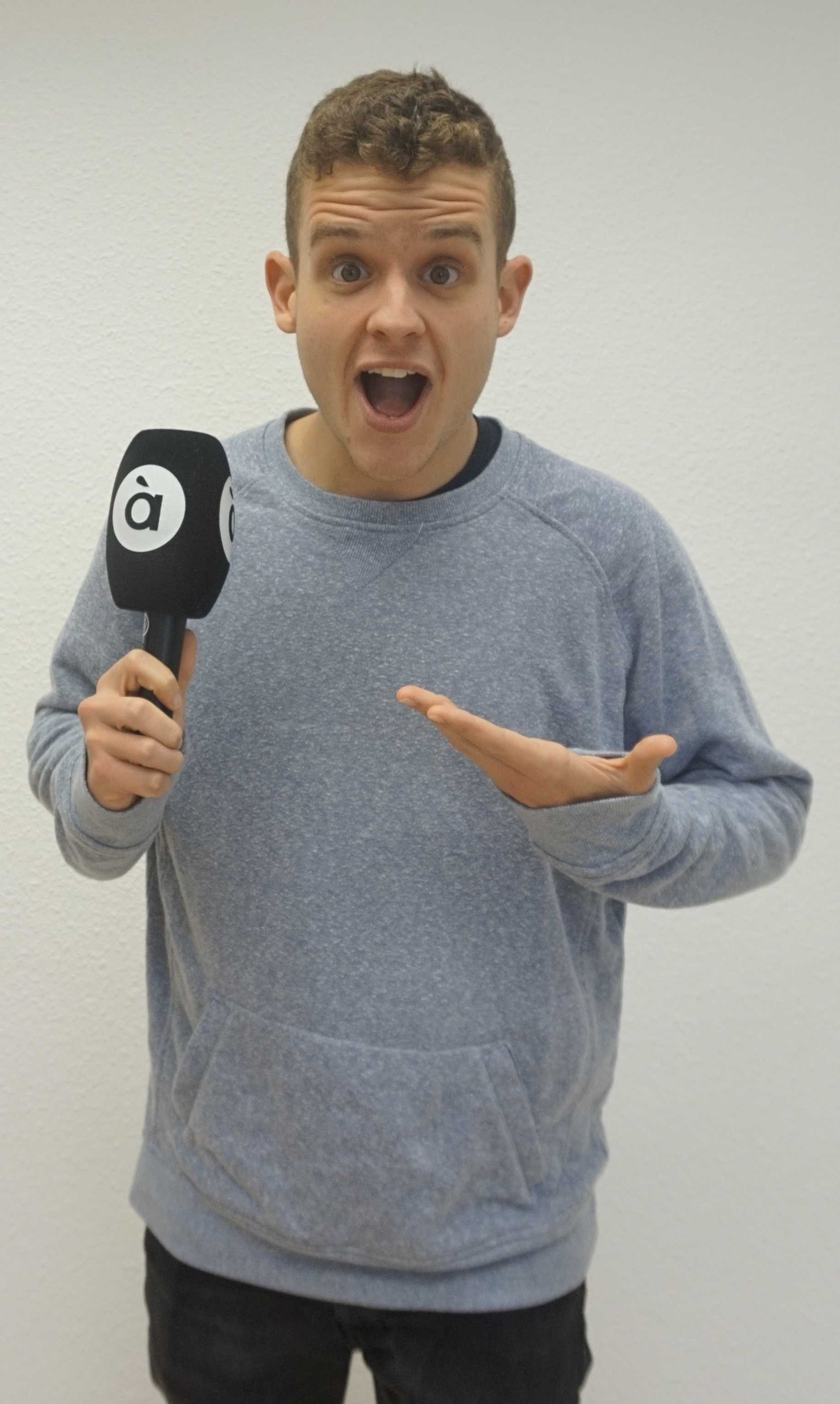 Imatges del raper valencià d'Alacant Arkano després de ser entrevistat per 'Territori Sonor', À Punt Mèdia.